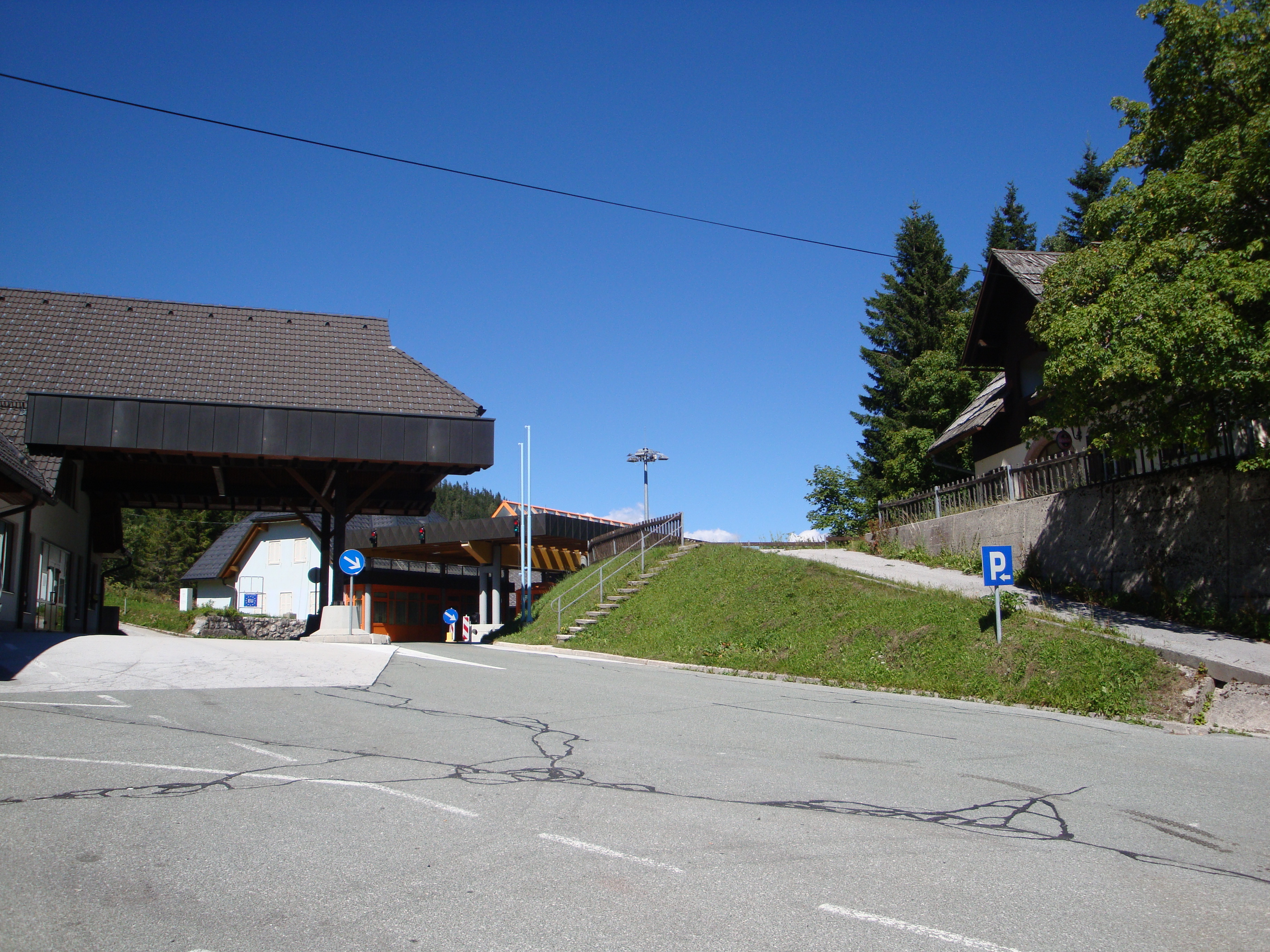 Jezerski vrh z nekdanjima mejnima objektoma